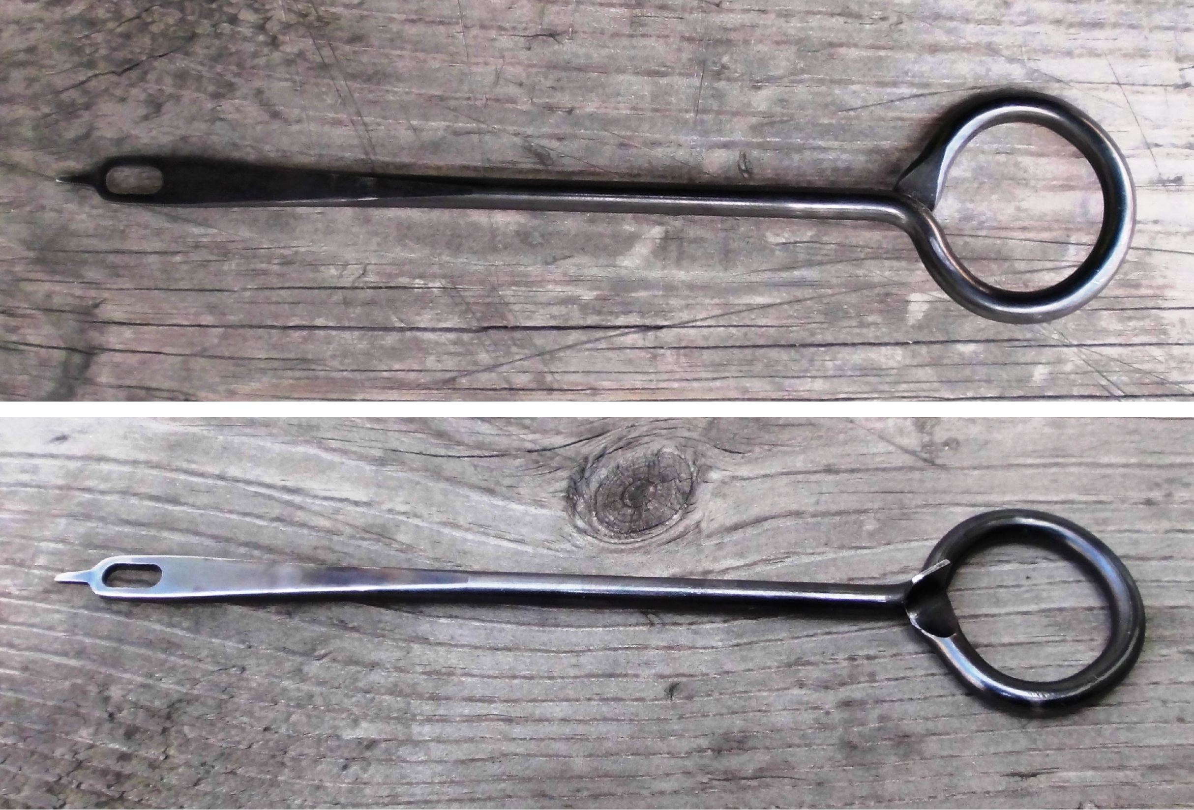 Штатный шомпол-протирка пистолета Макарова различных модификации, совмещает в себе шомпол, протирку, выколотку, отвёртку. В штатной кобуре для его ношения предусмотрены две лямки сбоку снаружи. Вид с двух сторон.